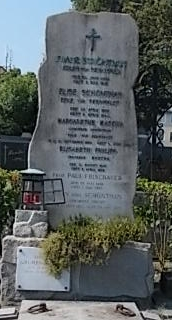 Franz von Schönthan-Döblinger Friedhof (32-29)